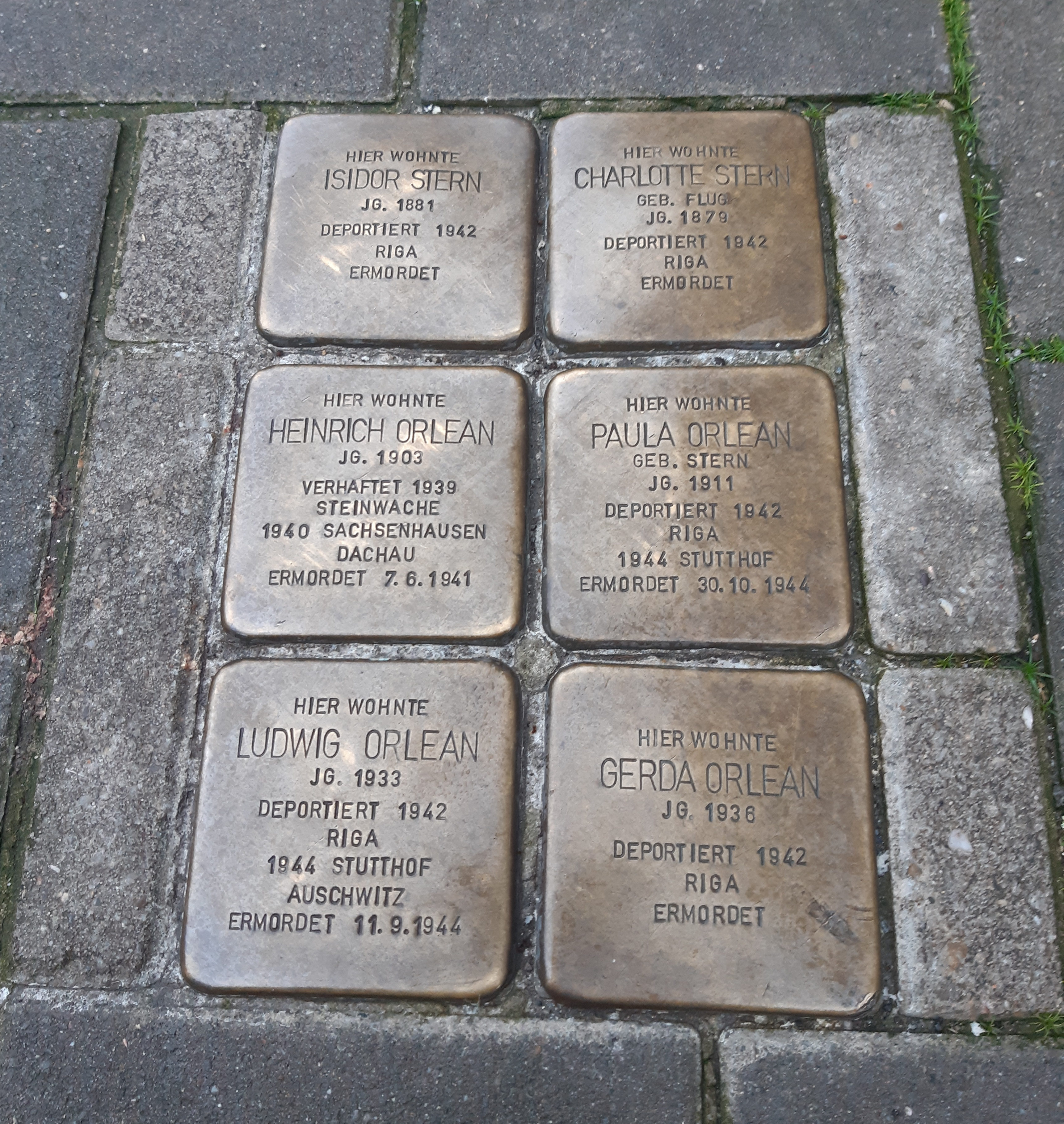 Stolpersteine Klosterstraße 4 in Dortmund